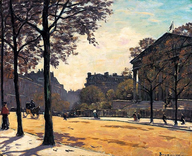 Une rue devant la Madeleine, huile sur toile de Louis Braquaval (1854-1919).